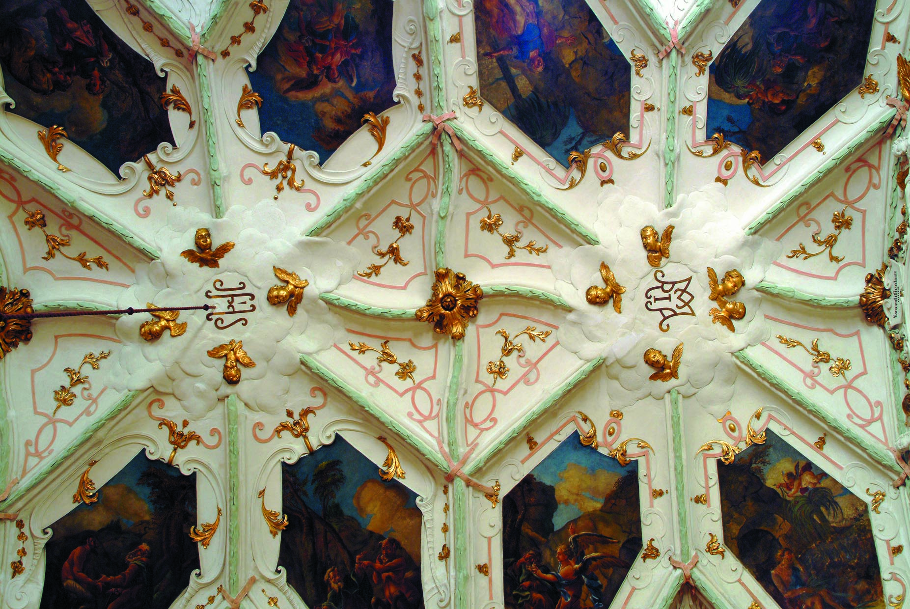 foto: Juraj Králik